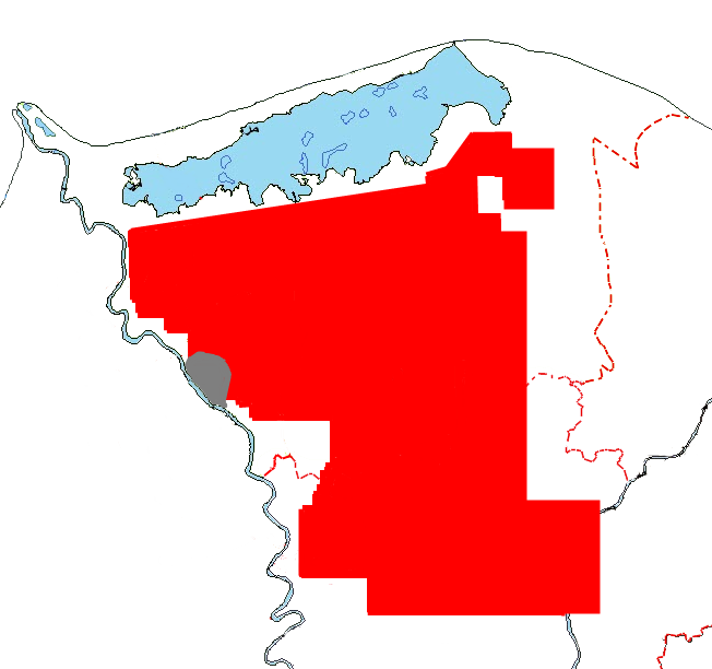 حقل دسوق للبترول والغاز الطبيعي، مصر حقل دسوق للغاز الطبيعي مدينة دسوق